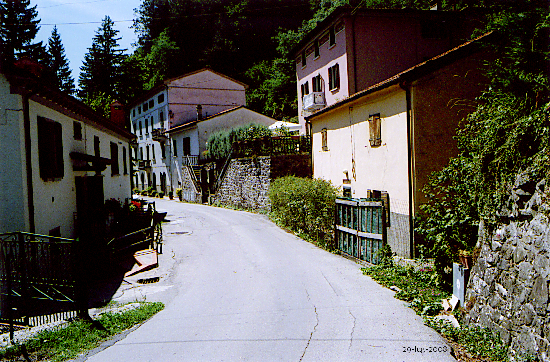 Scorcio di Via della Fontana di Pracchia con ville e abitazioni del primo Novecento. Foto mia del 14 agosto 2008 con clone Pentax reflex, grandangolo 28 mm, pellicola a 800 ISO.